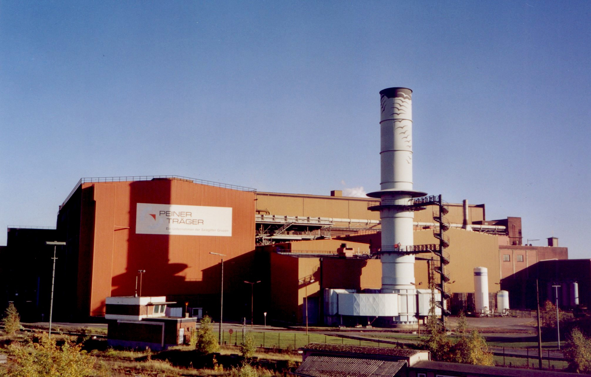 Das Peiner Elektrostahlwerk von der Nord-Süd-Brücke aus.